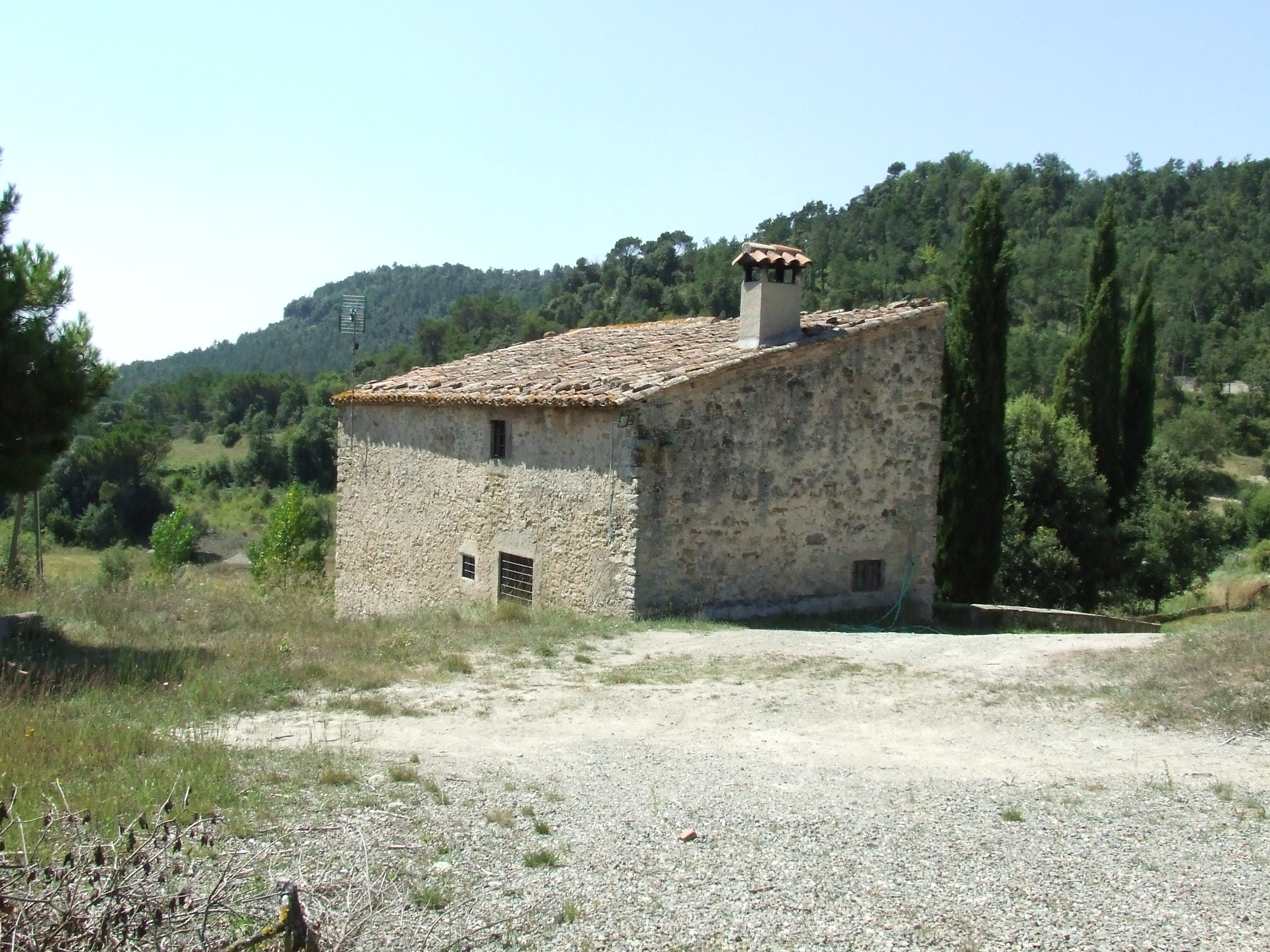 La Codina (Castellcir, Moianès)